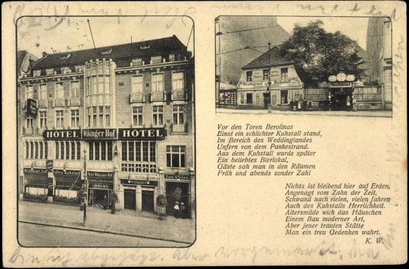 Hotel Wikinger Hof und das alte Lokal zum Kuhstall, Gedicht, Ansichtskarte, gelaufen 1912